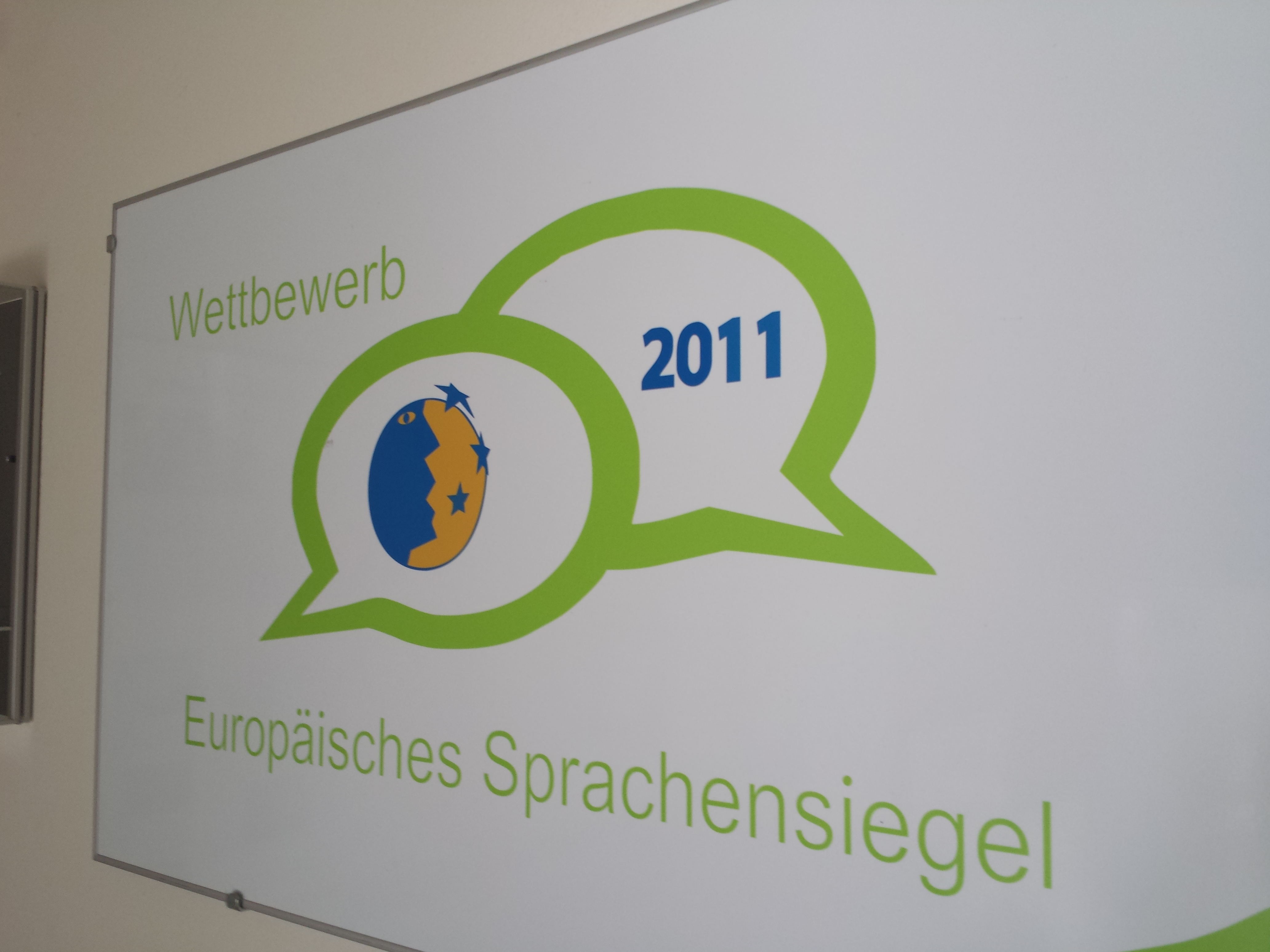 Kaufmännische Schule Tauberbischofsheim - Europäisches Sprachensiegel 2011 An der Schule wurden in Kooperation mit der französischen Schule „Lycée Alexandre Dumas“ in Illkirch (Elsass) und der Landesakademie für Fortbildung und Personalentwicklung an Schulen Baden-Württemberg wesentliche Inhalte des Landesakademie-Bildungsprojektes „Deutsch-französischer virtueller Online-Markt – anwendungsbezogenes Sprachenlernen durch Gründung virtueller Firmen und Abwicklung der Geschäftsprozesse“ entwickelt. Dieses wurde im Rahmen des Wettbewerbs „Sprachenlernen in der Gemeinschaft – Ressourcen nutzen und Kompetenzen ausbauen“ mit dem Europäischen Sprachensiegel 2011 ausgezeichnet.